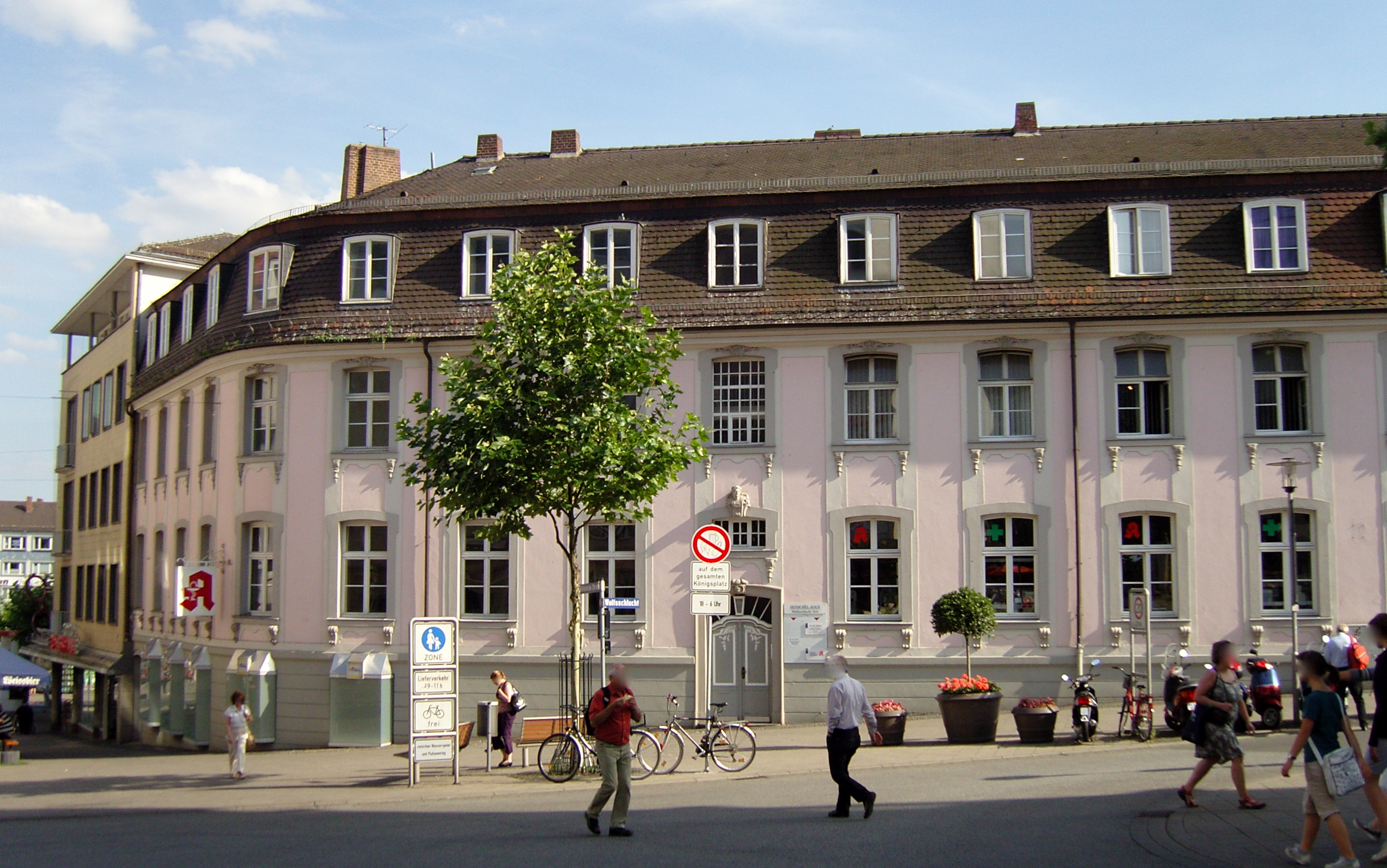 Das 1923 errichtete Henschelhaus des Architekten Karl Wittrock in Kassel an der Kreuzung Neue Fahrt / Kölnische Straße